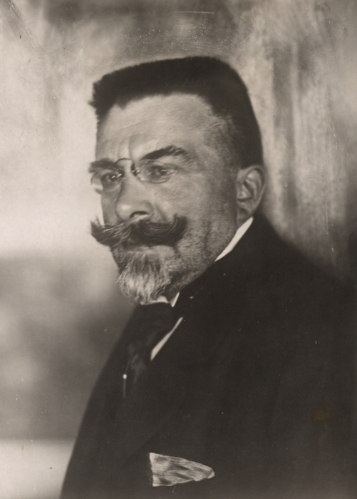 Ernst Seidler von Feuchtenegg (1862–1931) österr. Ministerpräsident